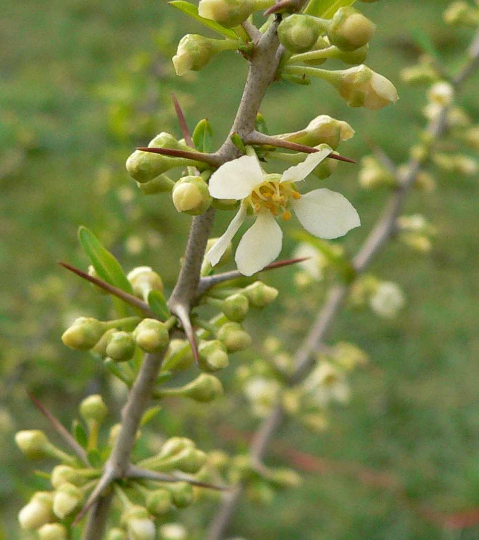 Prinsepia uniflora, Jardin des Plantes, Paris